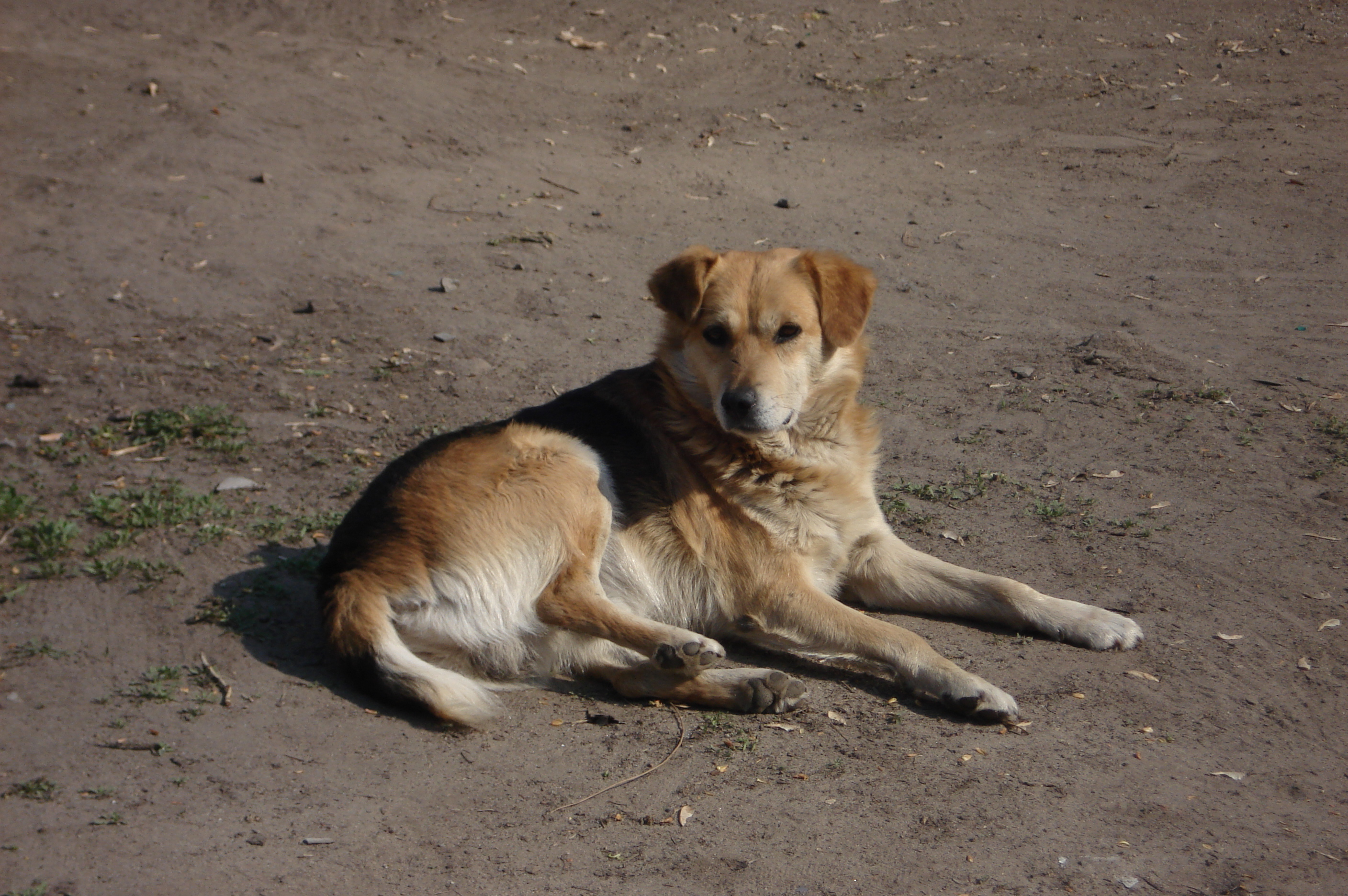 Дворовый кобель в Воронеже